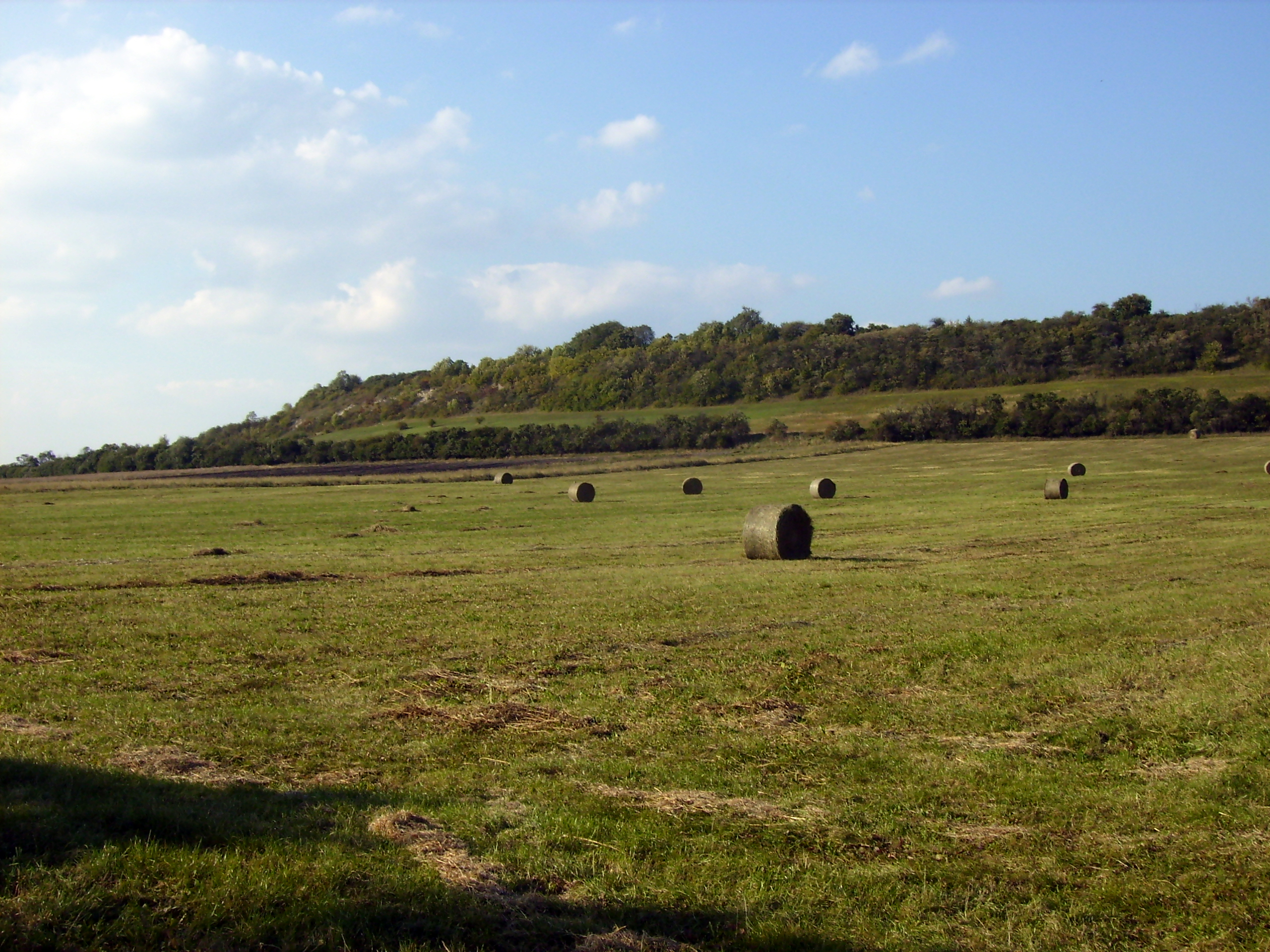 Jižní svah Přerovské hůry se sečenou loukou.